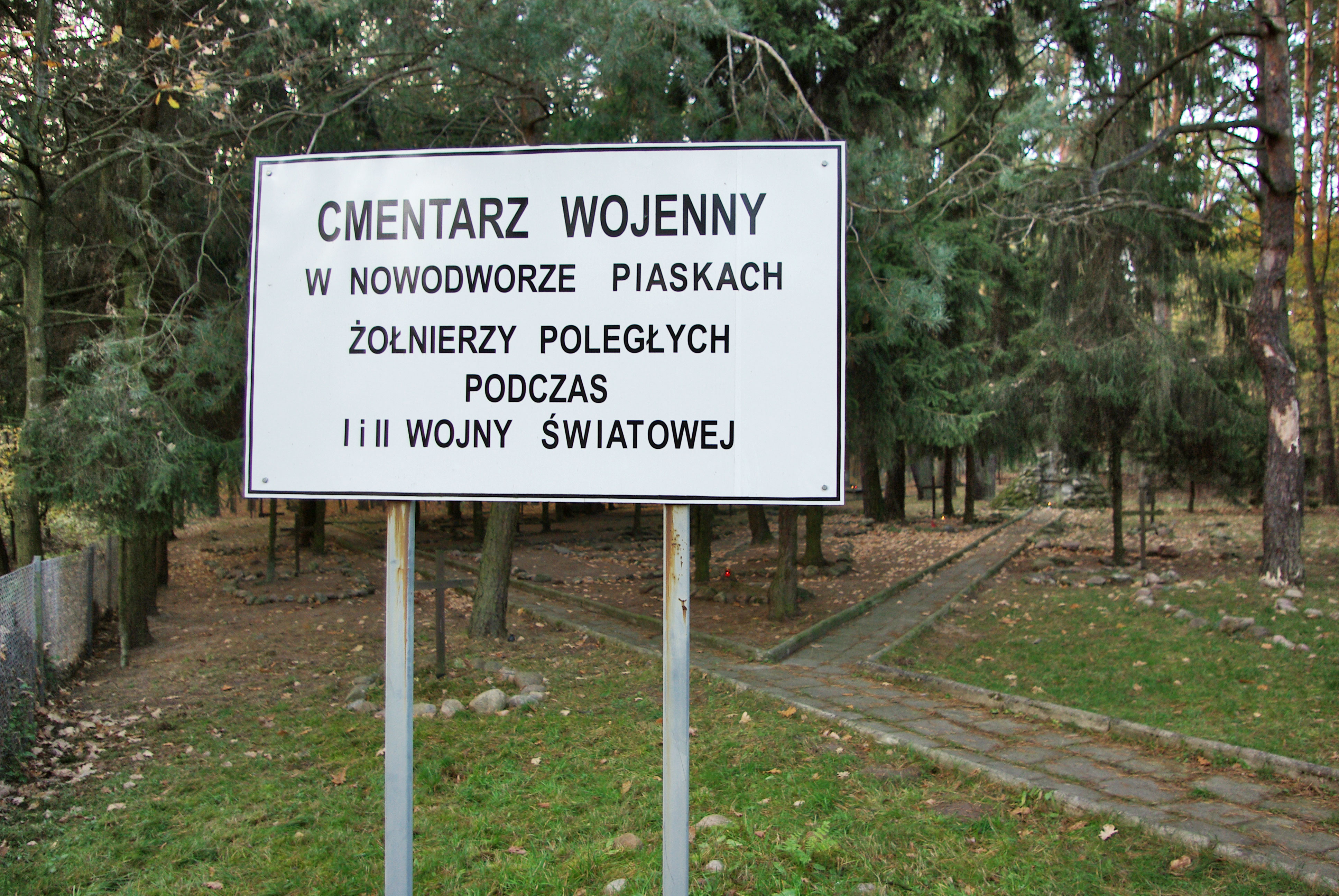 Cmentarz wojenny z I i II wojny światowej w Nowodworze Piaskach